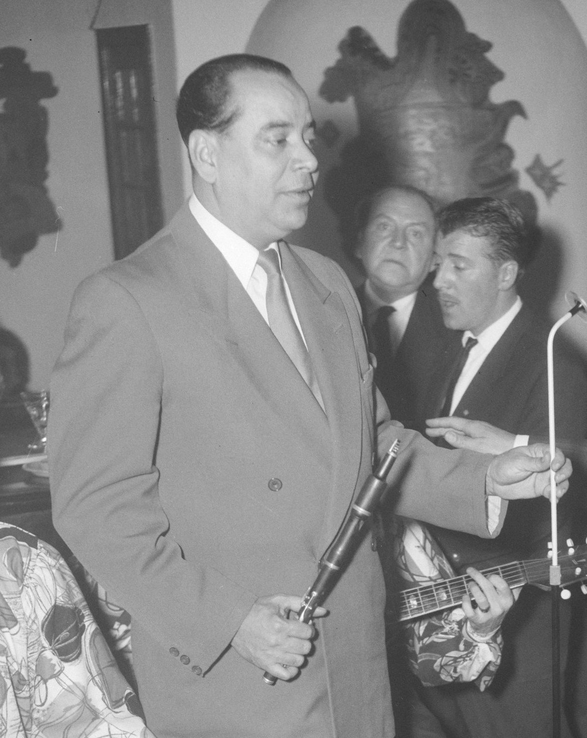 Collectie / Archief : Fotocollectie Anefo Reportage / Serie : [ onbekend ] Beschrijving : Edmundo Ros met Max Woiski op Schiphol Datum : 5 maart 1957 Locatie : Noord-Holland, Schiphol Fotograaf : Pot, Harry / Anefo Auteursrechthebbende : Nationaal Archief Materiaalsoort : Negatief (zwart/wit) Nummer archiefinventaris : bekijk toegang 2.24.01.04 Bestanddeelnummer : 908-3747 Reacties Geplaatst door Musicfan op 07 oktober 2015 - 19:01. Max Woiski sr. met zijn flageolet (soort fluit)